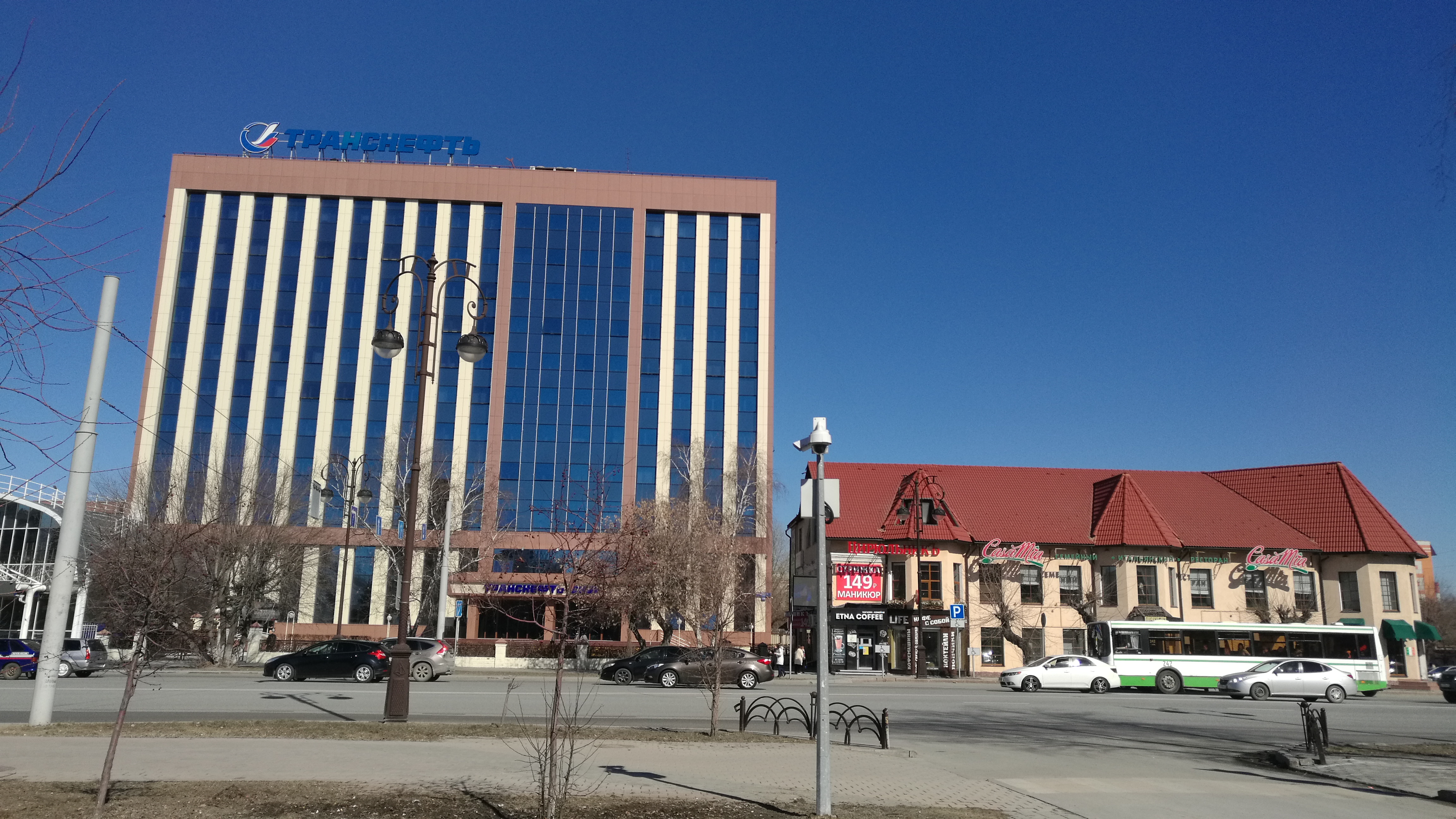 Oficejo de Transneft. Tjumeno, Rusio.